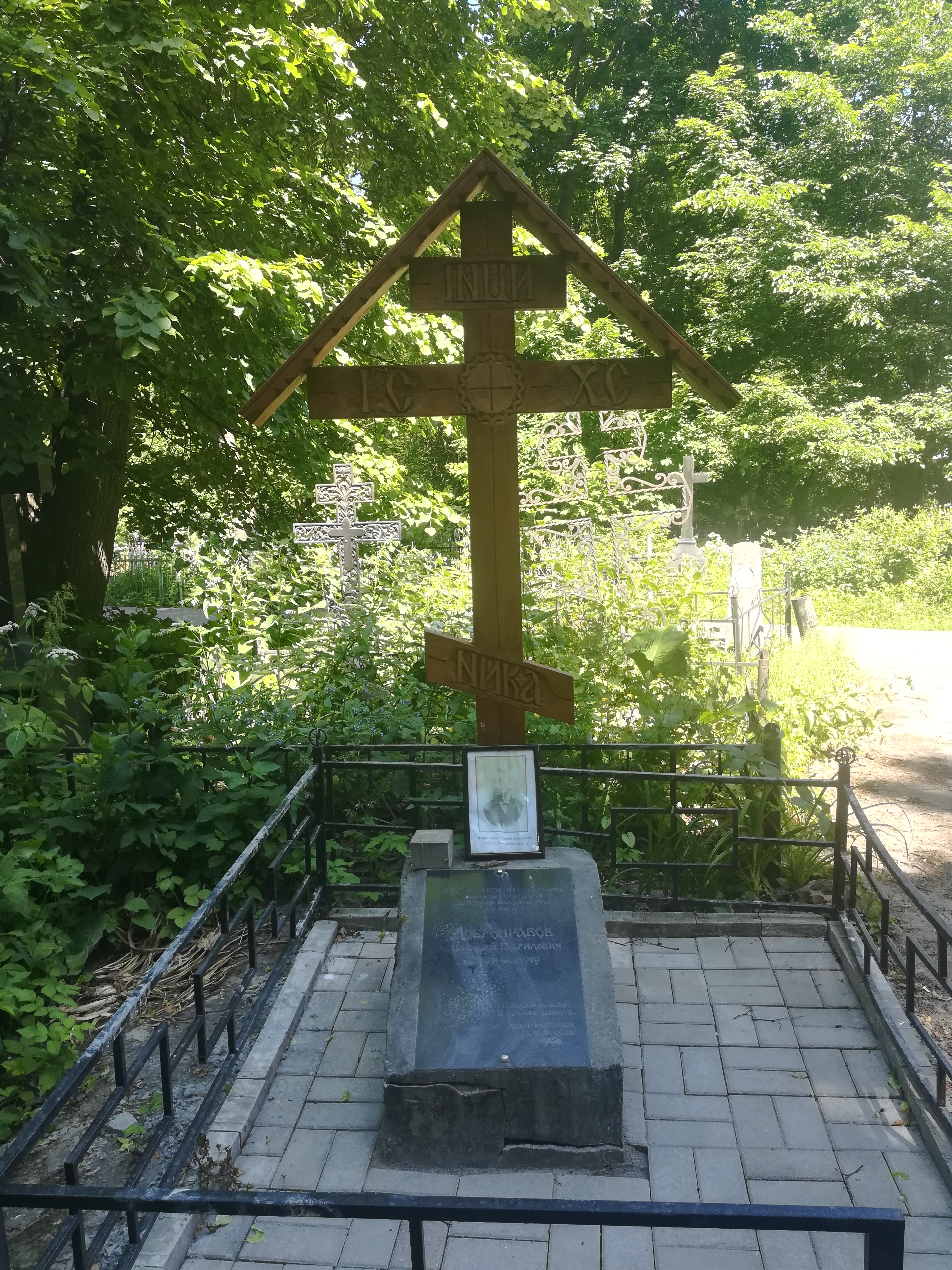 Владимир